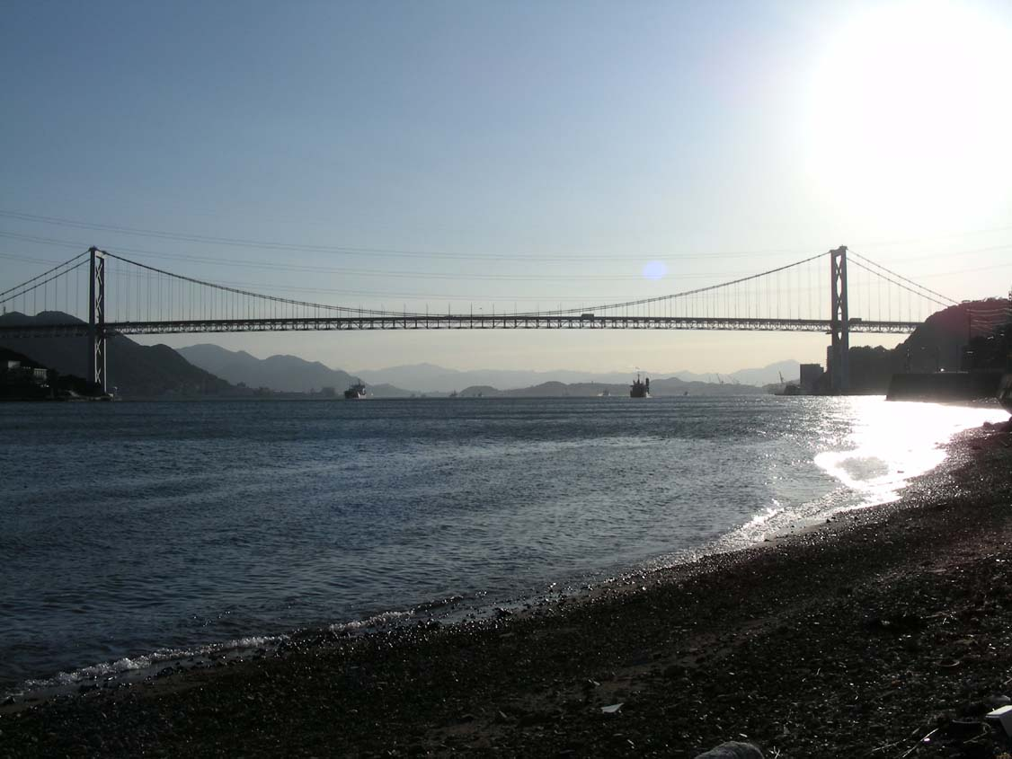 山口県下関市壇ノ浦。関門海峡。2007年11月投稿者撮影。